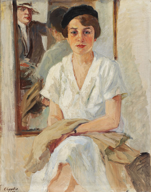 Selfportrait and portrait